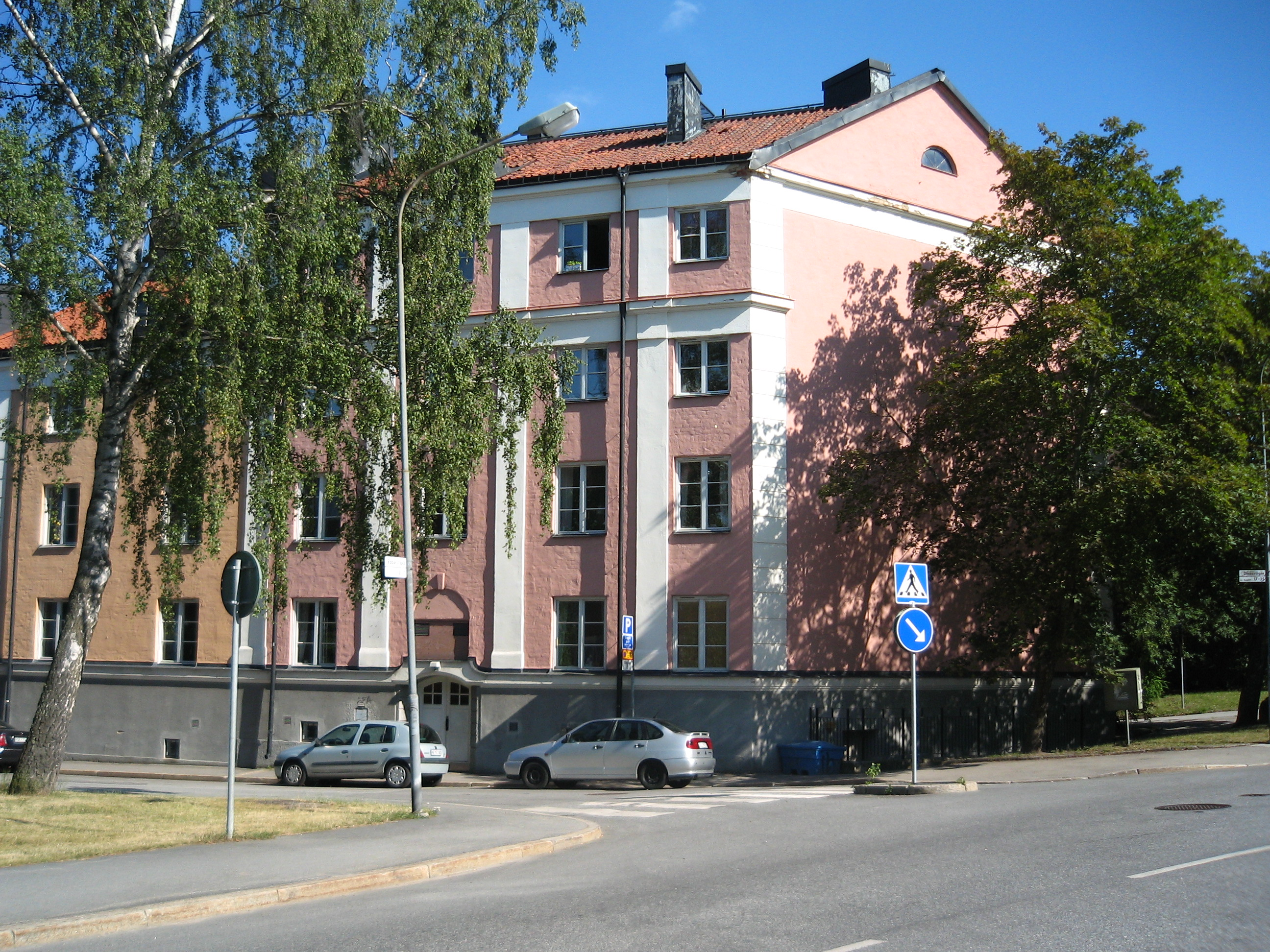 Långkorven Hjorthagen, Stockholm, Dianavägen. Byggnadsår 1921. Arkitekt Axel Wetterberg